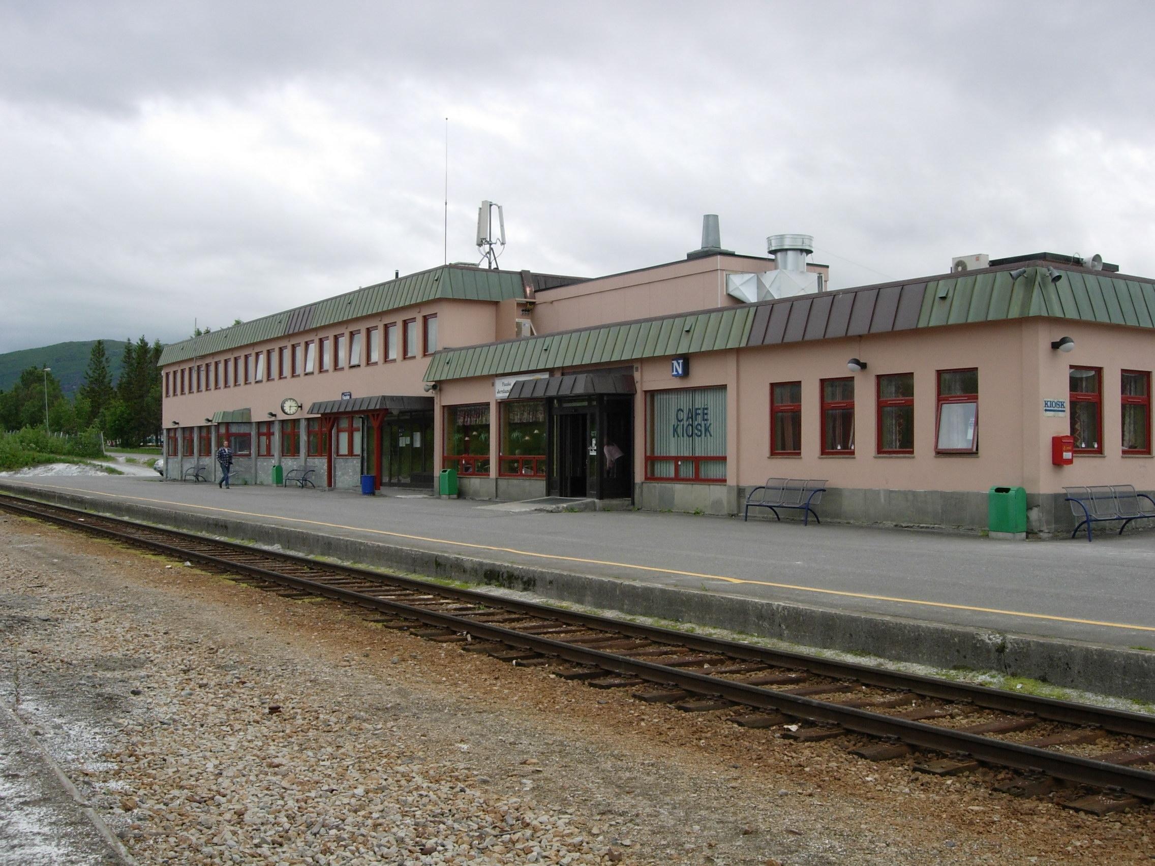 Fauske stasjon on Nordlandsbanen, Norway